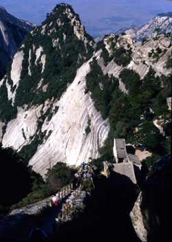 Gebirgspfad im Huashan-Gebirge in der VR China, Provinz Shaanxi